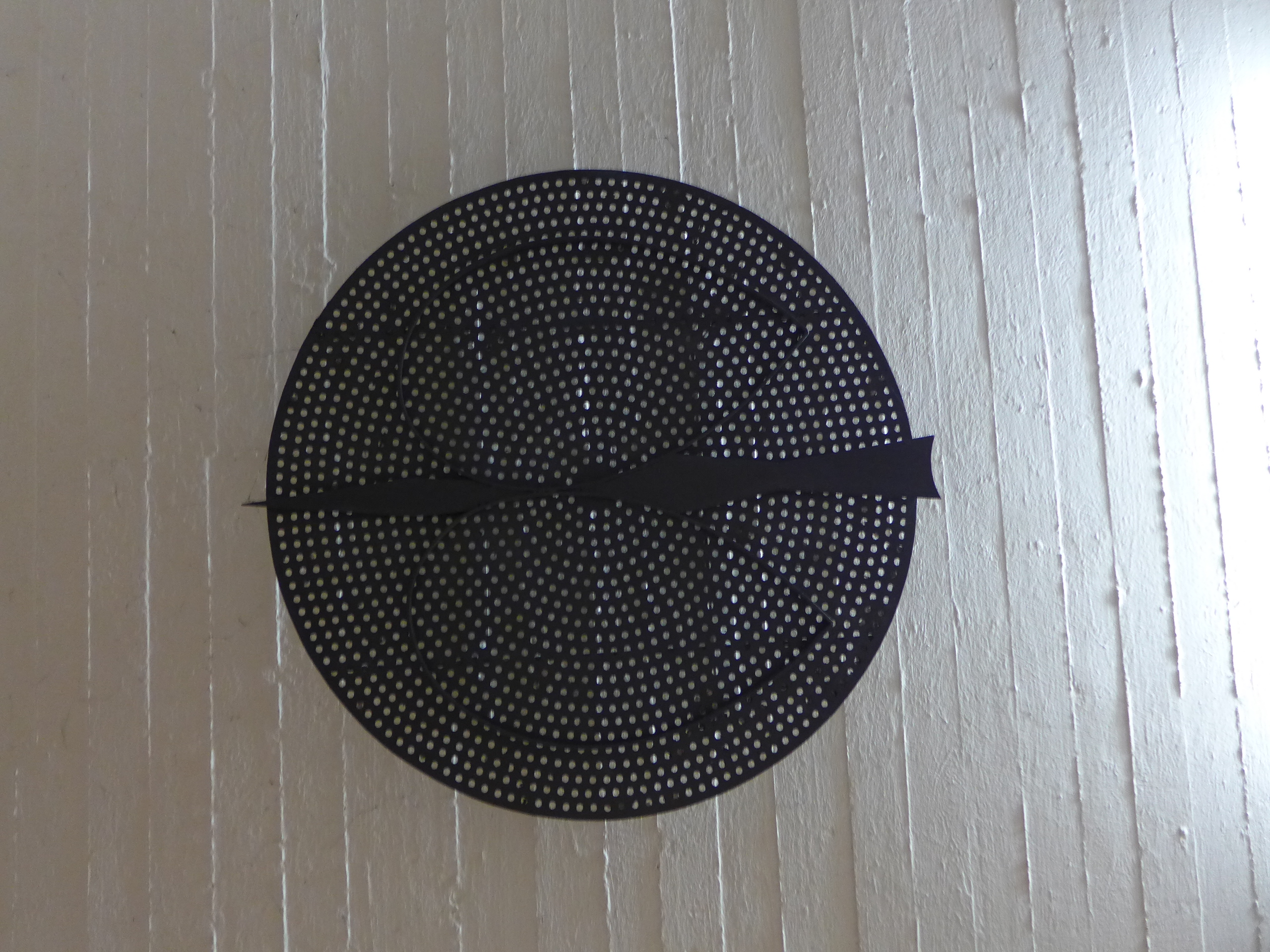 St. Josef (Diefflen), Metallinstallation an der Decke der Eingangshalle des Turmes